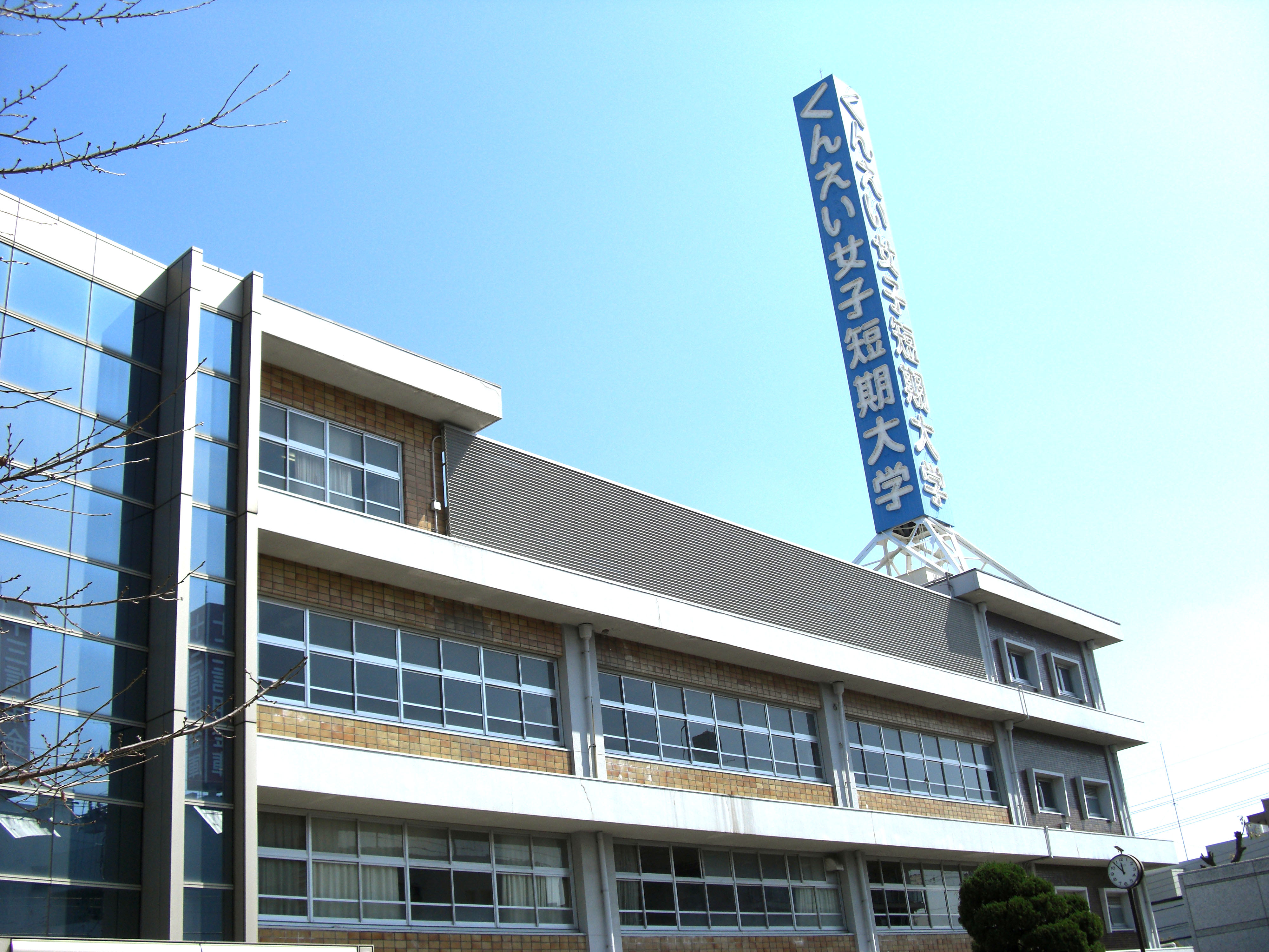 Osaka Kun-ei Women's Junior College,Shojaku Settsu-shi Osaka Japan.